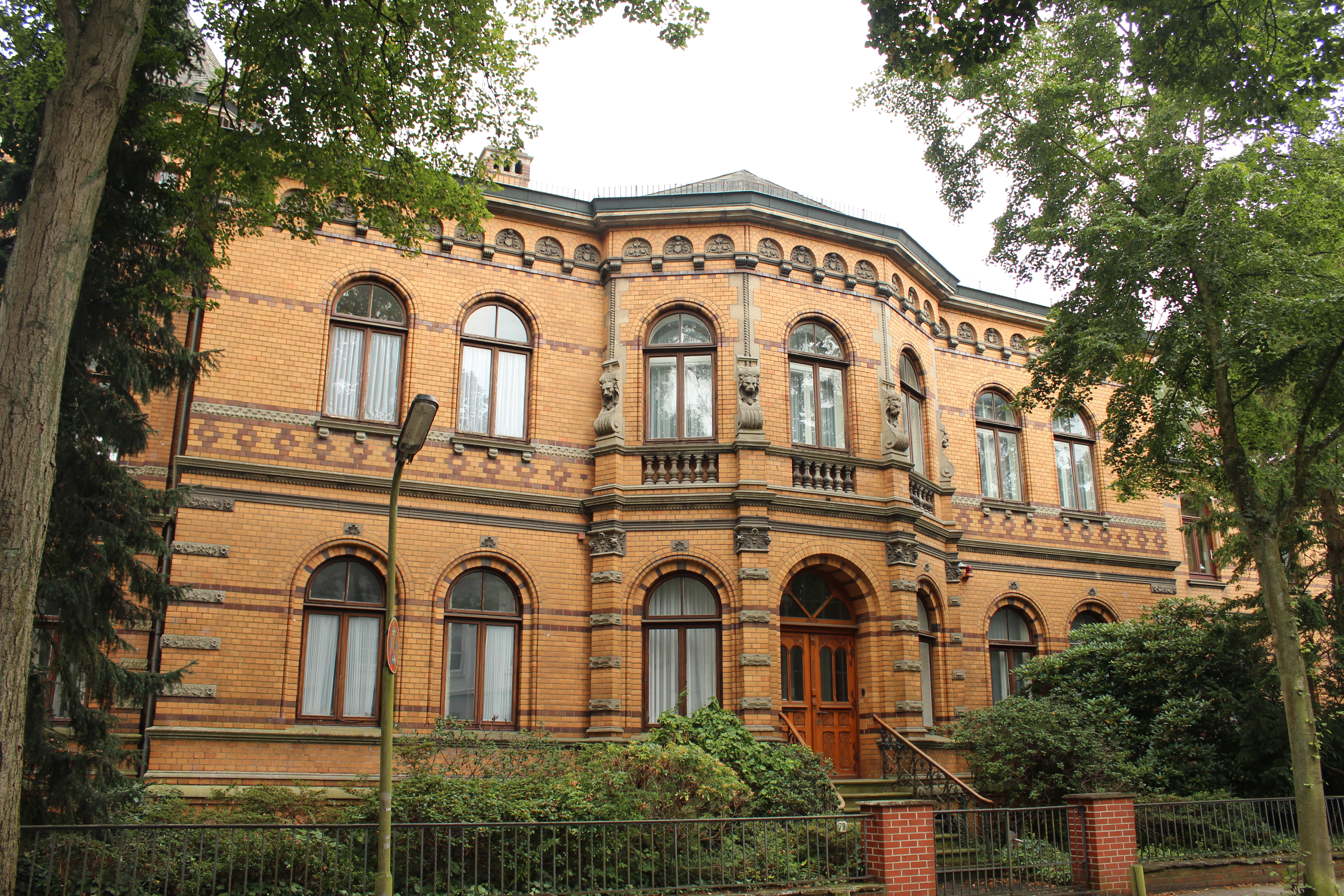 Villa Schröder in Bremen, Weserstraße 79.Das abgebildete Objekt ist ein geschütztes Kulturdenkmal in der Freien Hansestadt Bremen, mit der Nr. 1334 beim Landesamt für Denkmalpflege registriert.